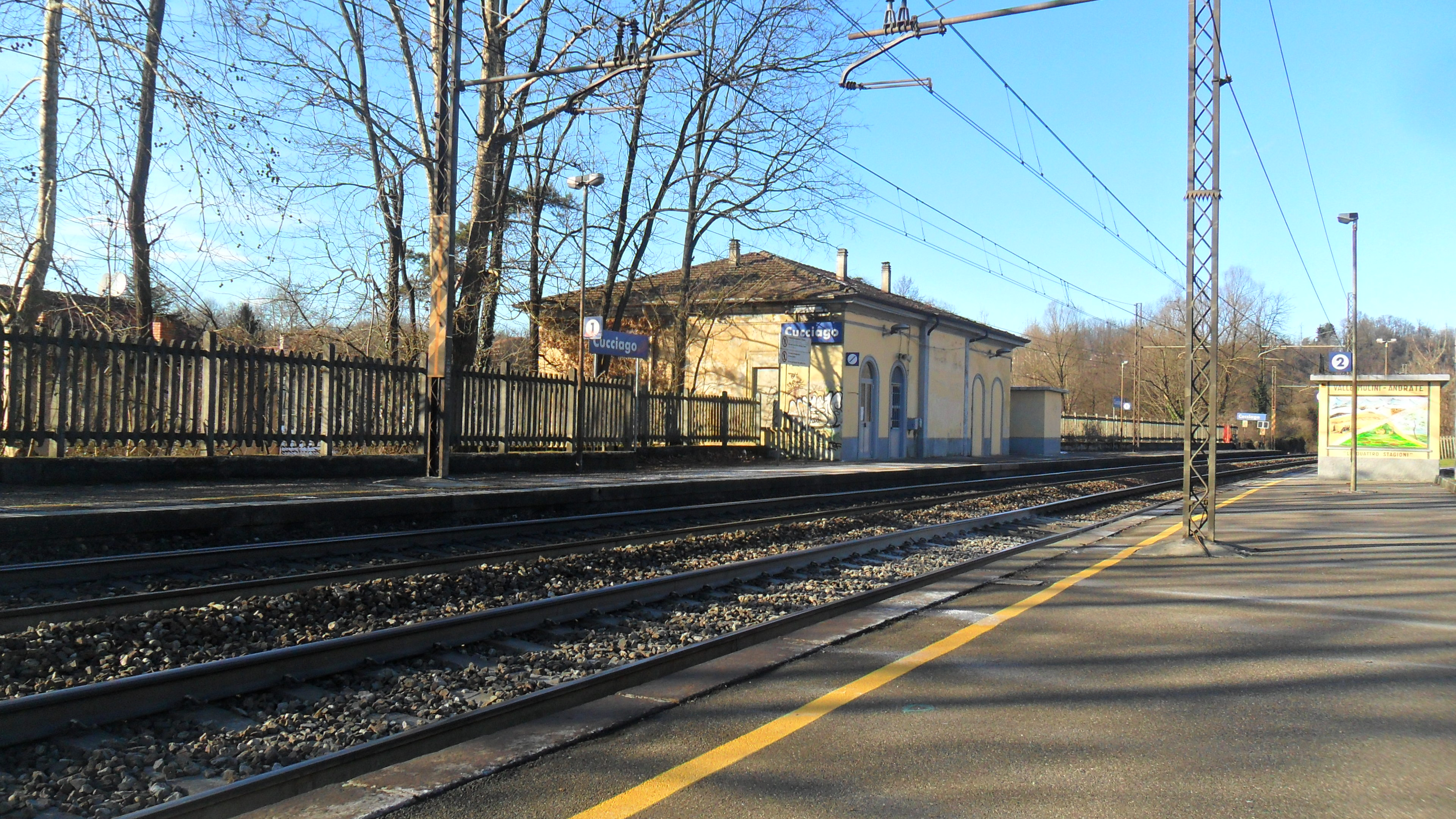 Stazione ferroviaria di Cucciago.